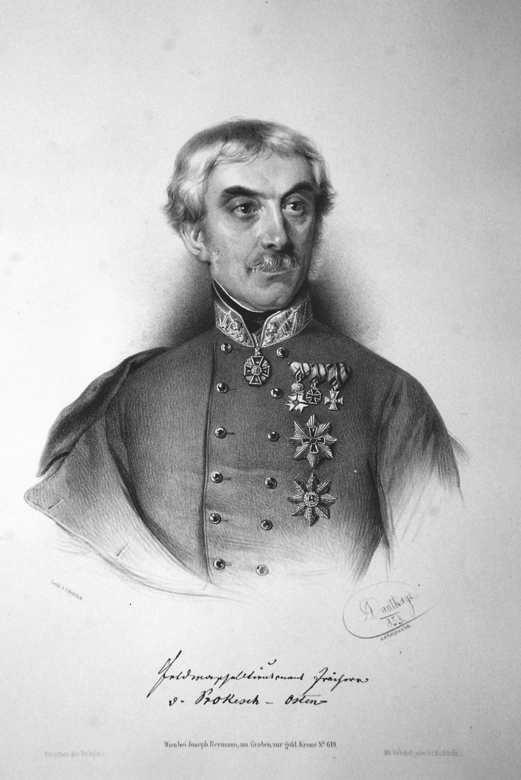 Anton Prokesch von Osten (1795-1876), Graf, Diplomat, Feldzeugmeister, Mitglied der Akademien der Wissenschaften in Wien und Berlin, Orientalist, Numismatiker. Lithographie von Adolf Dauthage, 1853